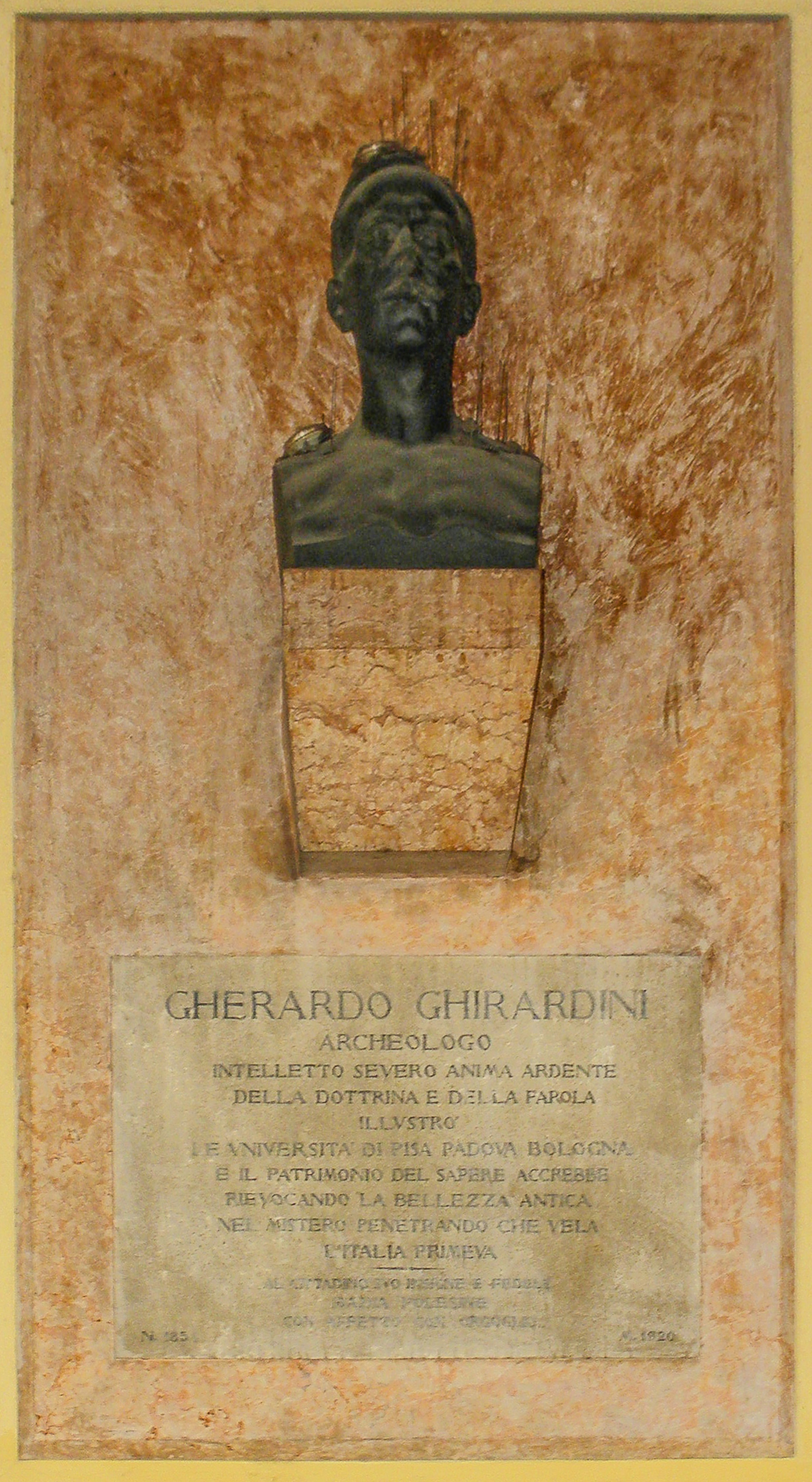 Badia Polesine, il monumento commemorativo in memoria di Gherardo Ghirardini sito nel porticato del Palazzo del Comune.